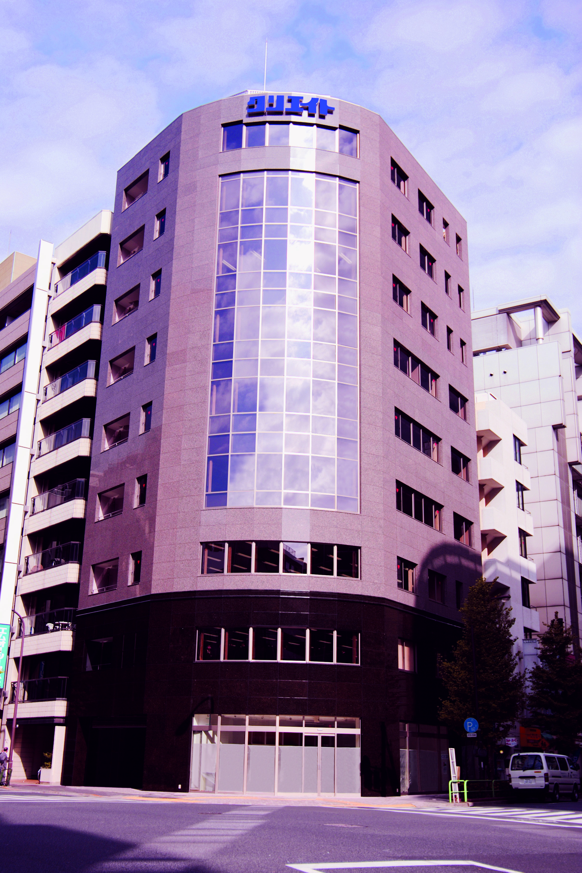 クリエイト本社